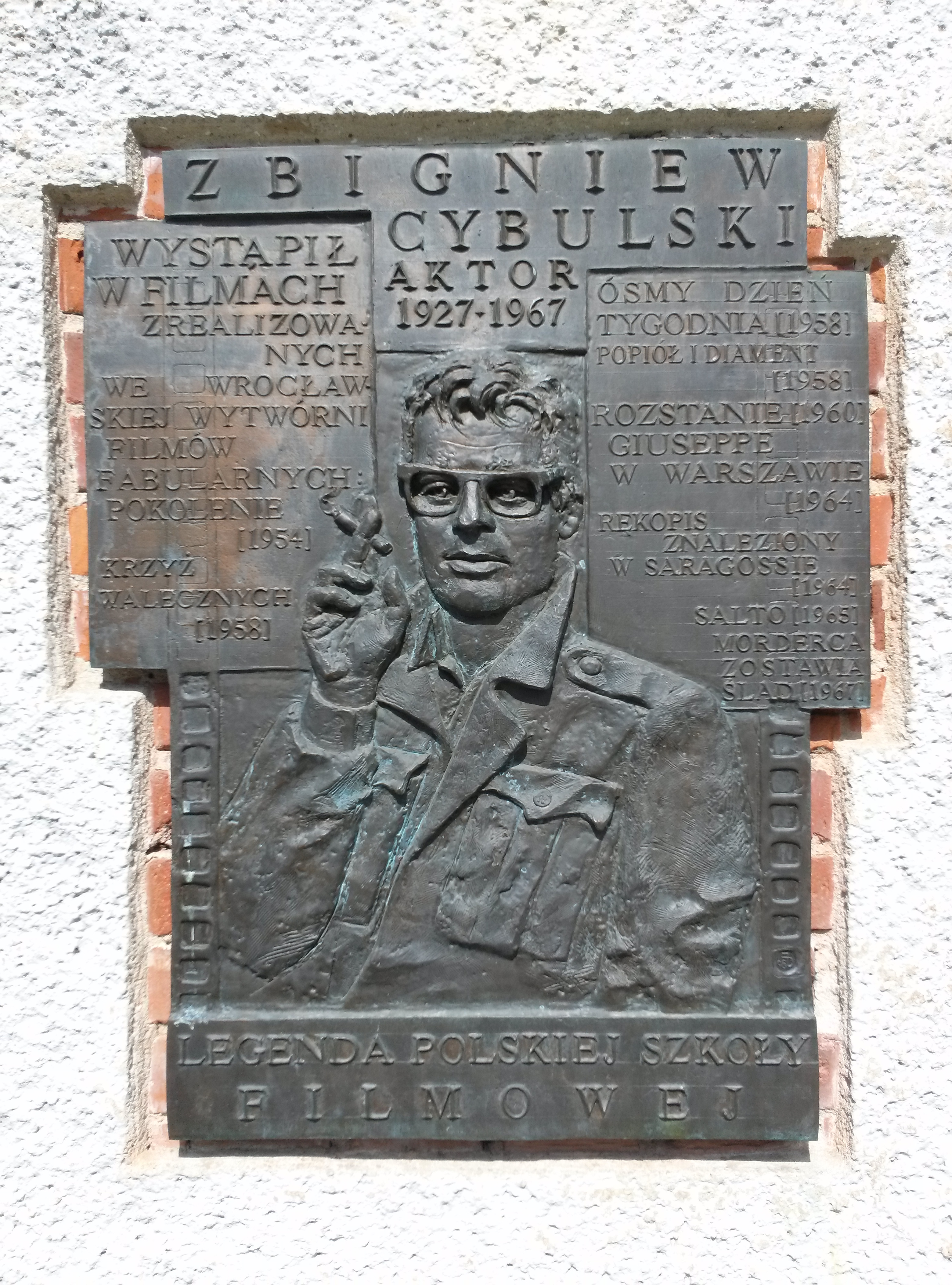 Wrocław, Wrocławska Wytwórnia Filmów Fabularnych - tablica pamiątkowa poświęcona Zbigniewowi Cybulskiemu